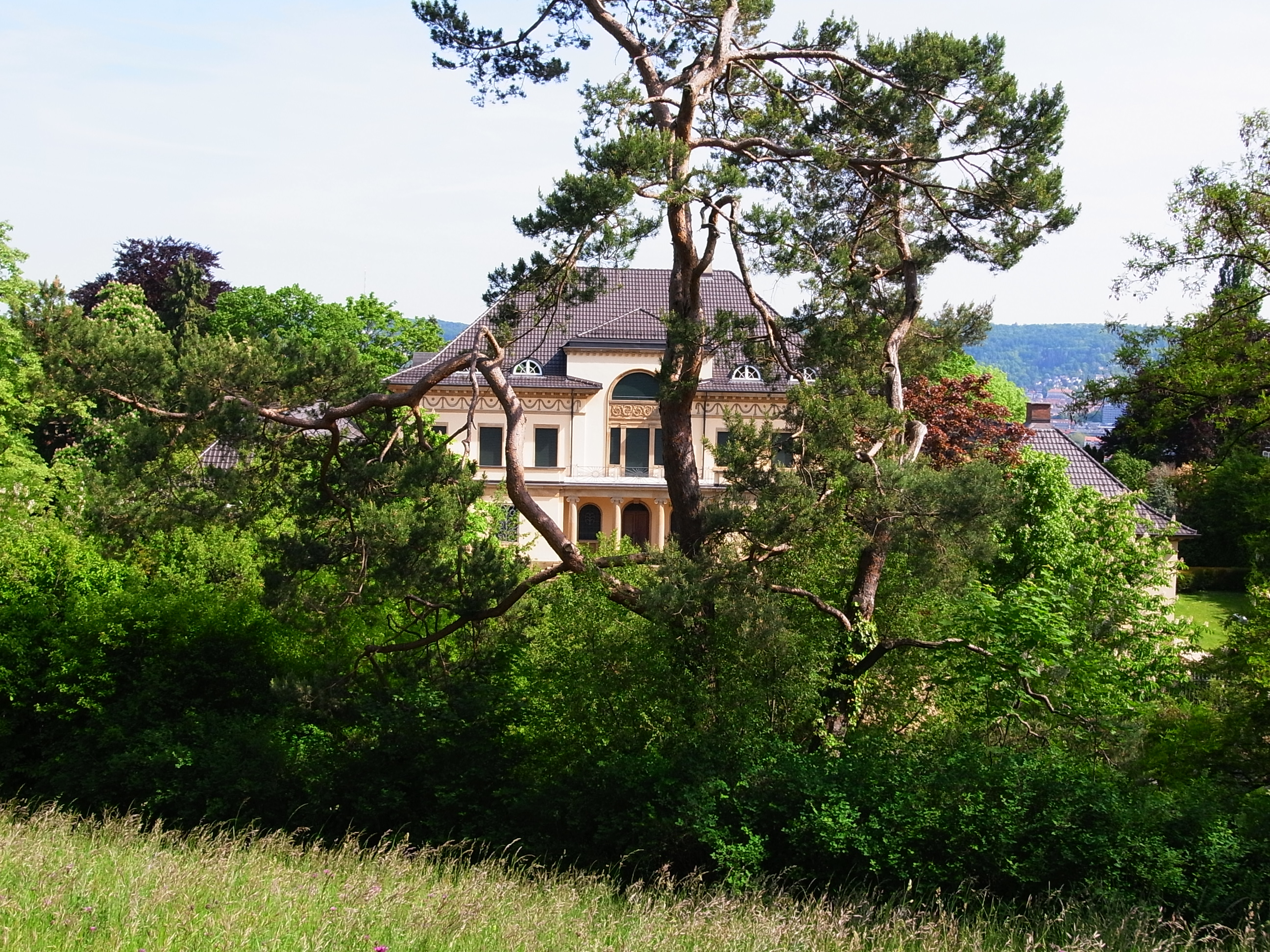 Die Villa Levi (Fabrikantenvilla) - Salamander-Villa